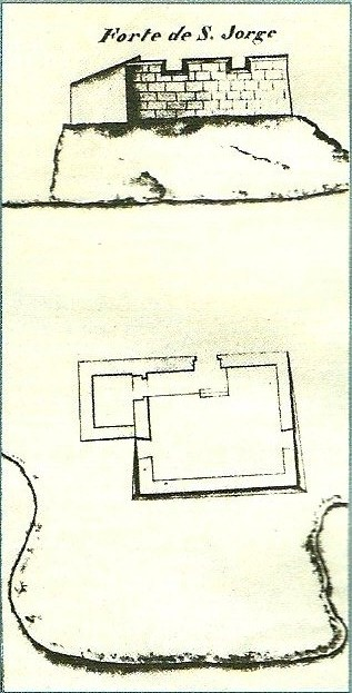 Forte de São Jorge, s/d, autor desconhecido, Arquivo Histórico Militar, Lisboa. in MARTINS, José Salgado, "Património Edificado da Ilha Terceira: o Passado e o Presente". Separata da "Atlântida", vol. LII, 2007. p. 44.